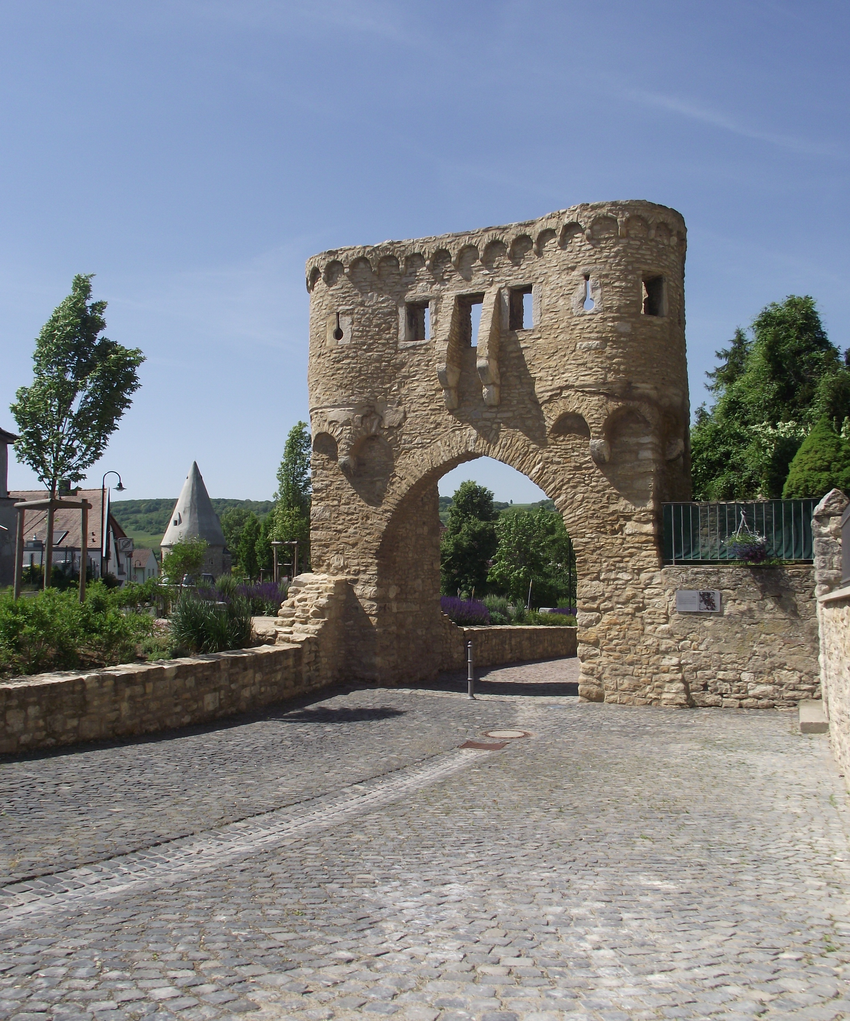 Ostseite des Uffhubtores in Ober-Ingelheim